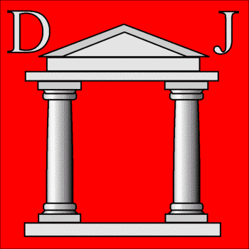 baron officier de la maison princes